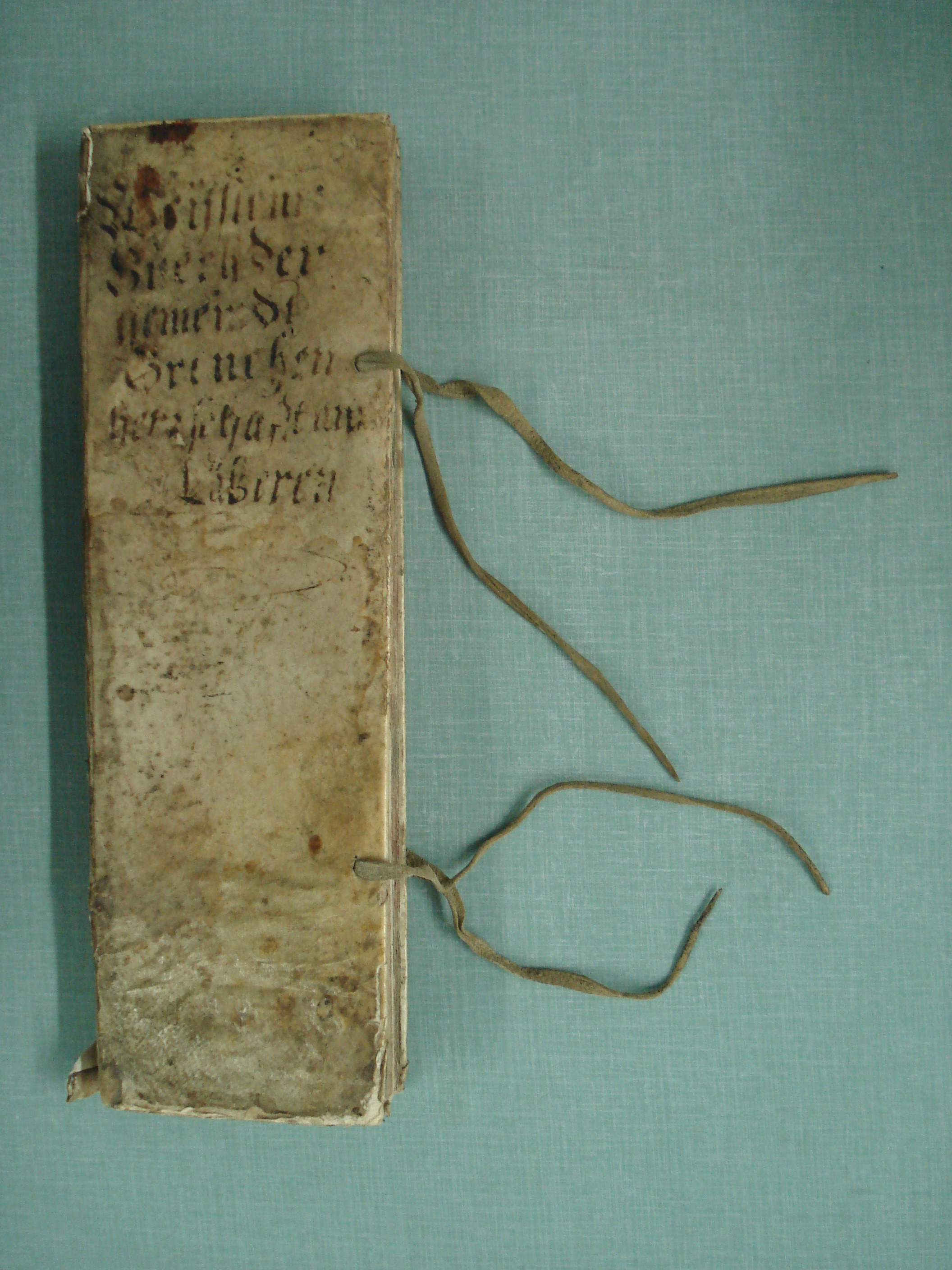 „Das «Weyslein Buech der Gemeindt Grenchen herrschaft am Läberen». Das schmale, hohe, in Pergament gebundene Buch verzeichnet auf 194 Seiten die Waisengelder der Jahre 1679 bis 1719 und ist eine wichtige Quelle zur Grenchner Familiengeschichte; alle damaligen Grenchner Familien erscheinen entweder auf der «Lichtseite» (als Betreuer von Waisen) oder auf der «Schattenseite» (als Waisen).“ (Hans Kaufmann; Rolf Max Kully: Semper curiosus: Hans Kaufmanns kleinere Schriften zu Grenchen und Umgebung. Grenchen, 1995, S. 111. OCLC 891318958)